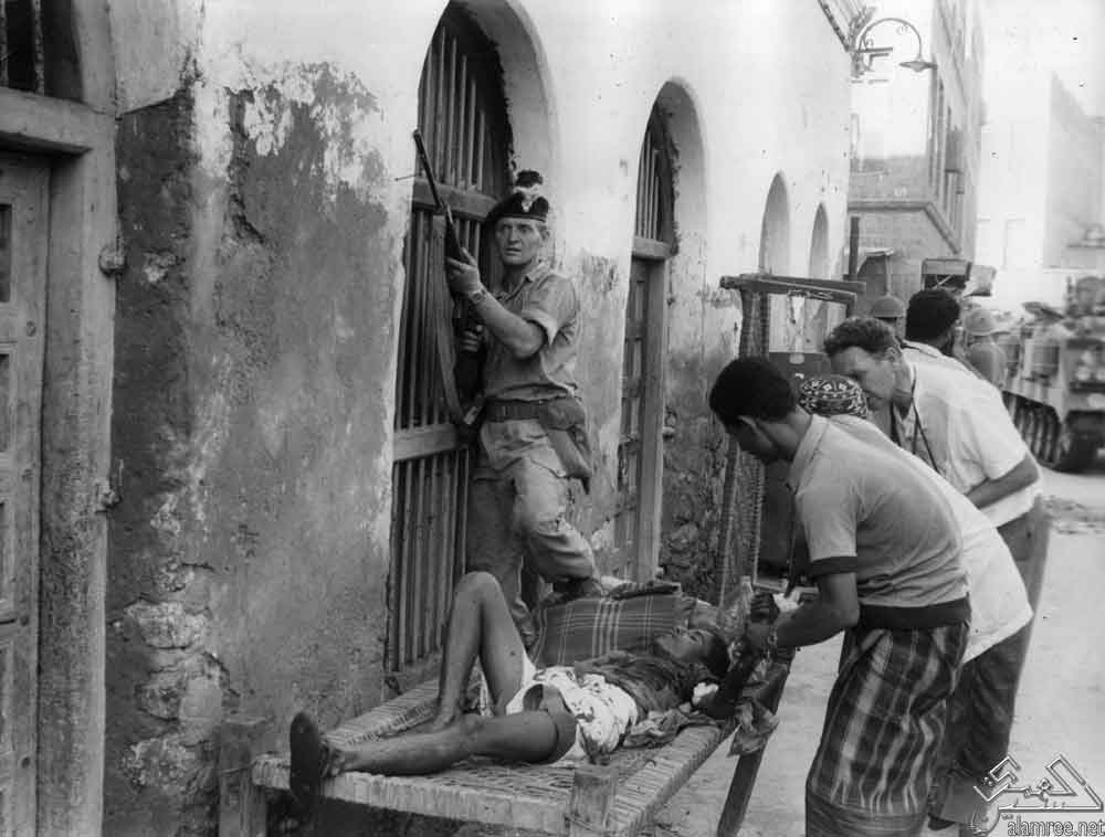 حندي بريطاني 3 ابريل 1967